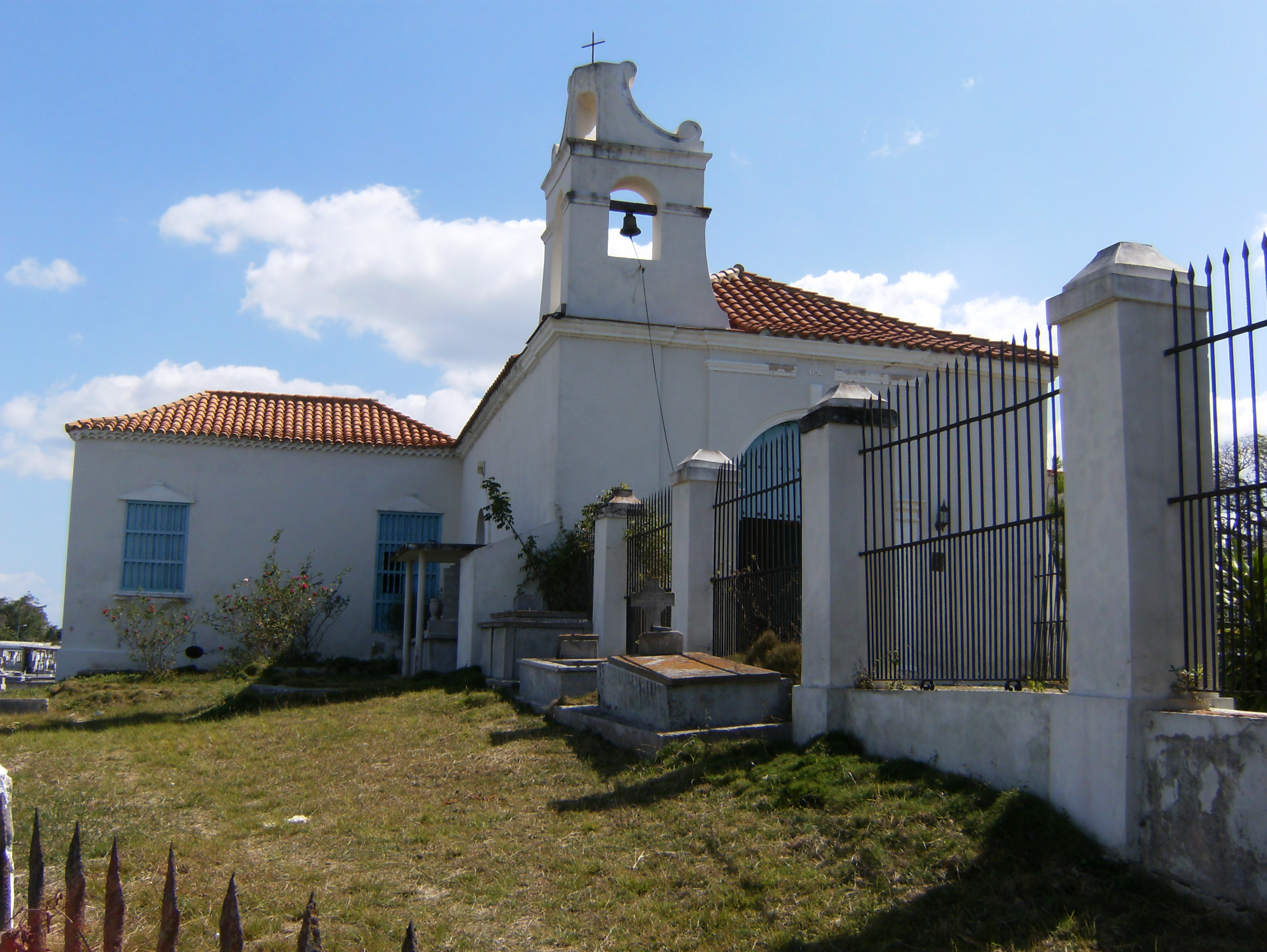 Capilla existente en el cementerio viejo del municipio de Guanabacoa, Cuba. Considerada una de las más antiguas